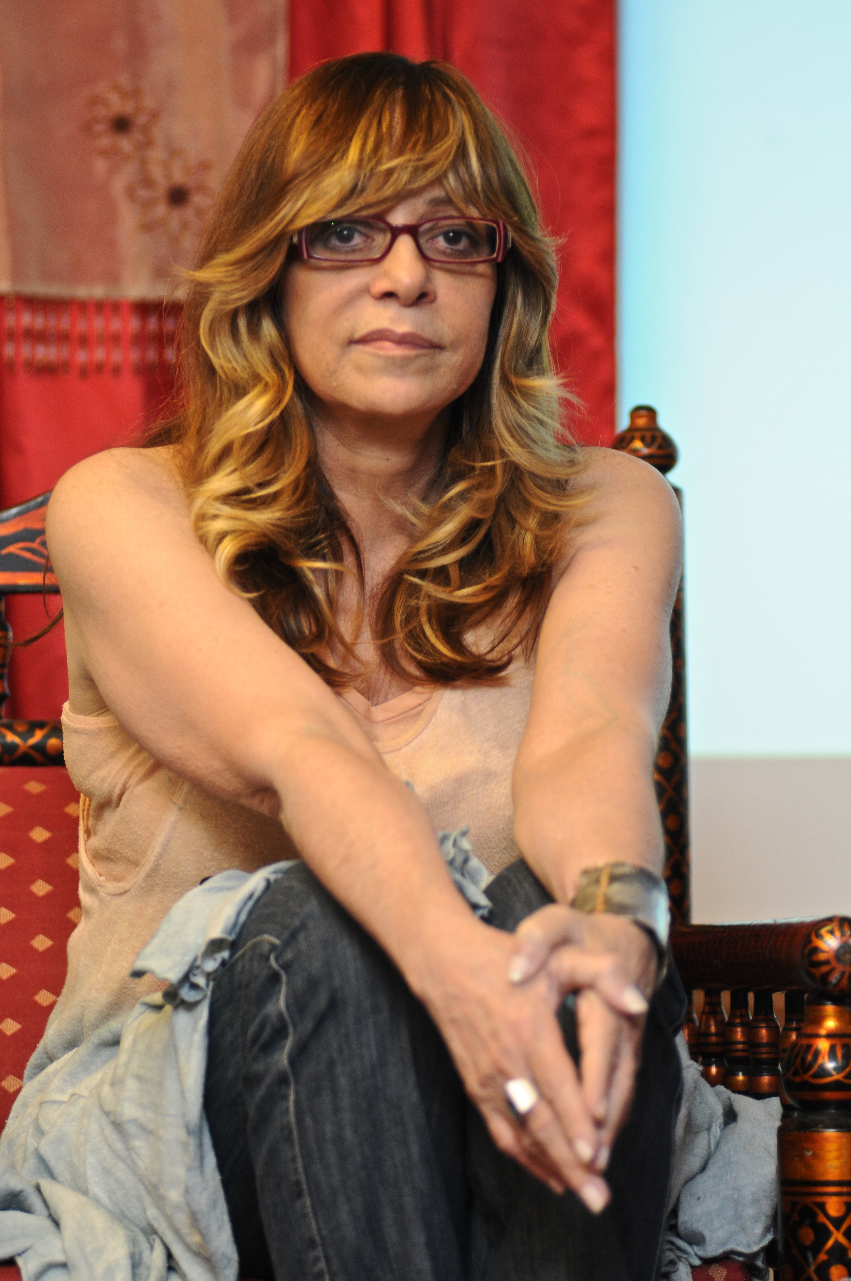 Glória Perez, Brazilian television telenovela writer